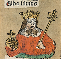 Зображення Альба Сільвія у Нюрнберзькій хрониці.